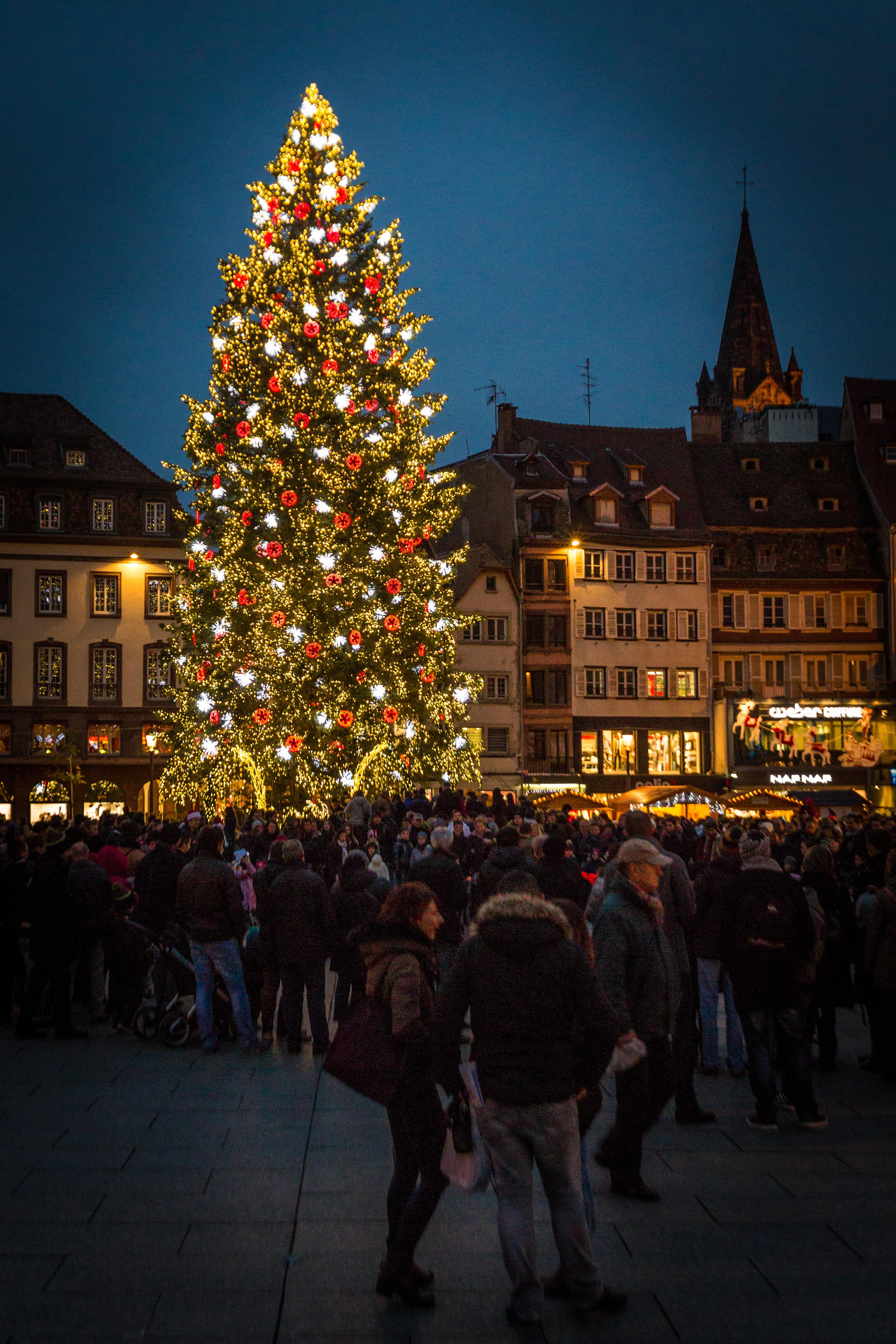 Strasbourg capitale de Noël, le grand sapin version 2014